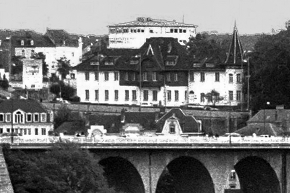 Déi fréier Molkerei a Sëtz vun der Bauerenzentral um Boulevard d'Avranches.